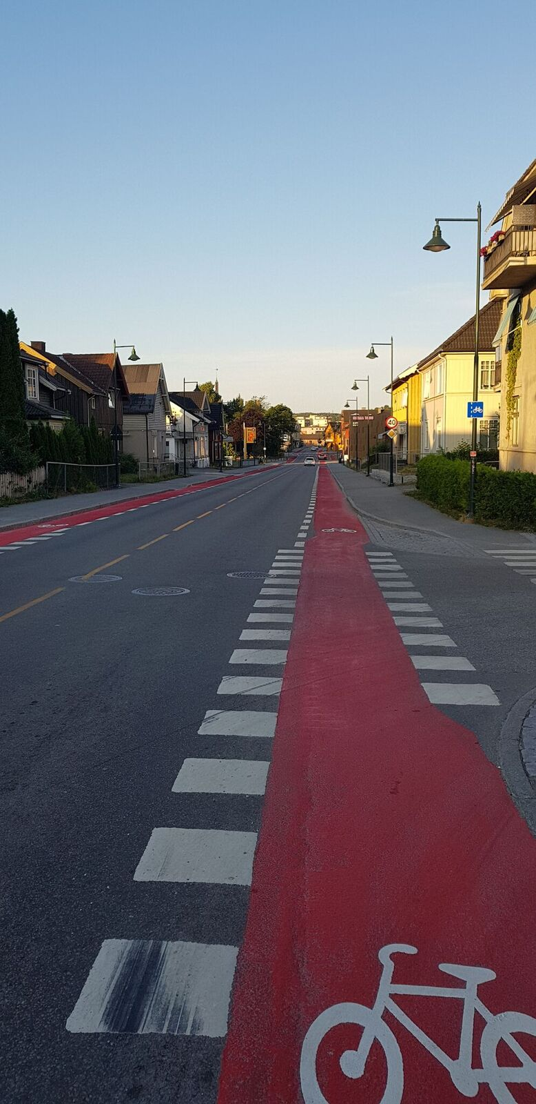 Hønengata mot sør, sett fra krysset med Gullagata, Hønefoss i Ringerike kommune, Buskerud/Viken